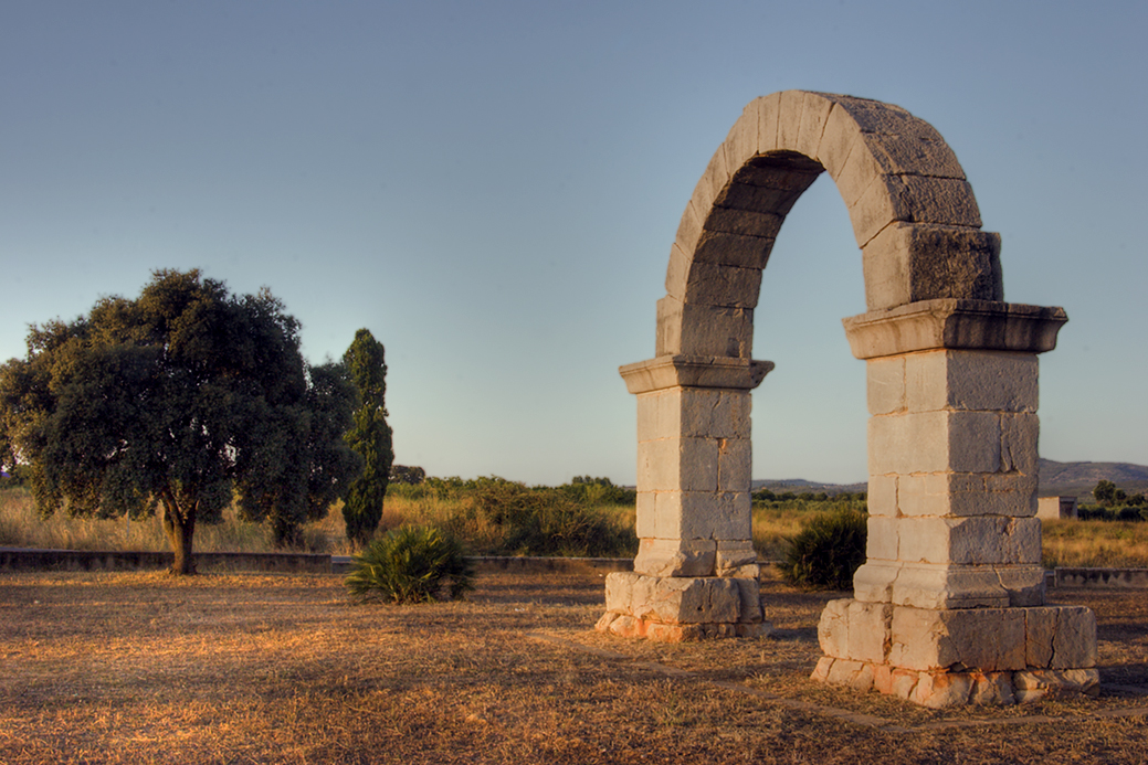 Arco romano situado en la población de Cabanes (Castellón de la Plana)